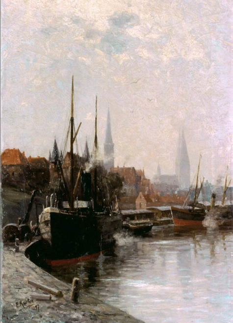 Hafen von Lübeck (Ausschnitt)